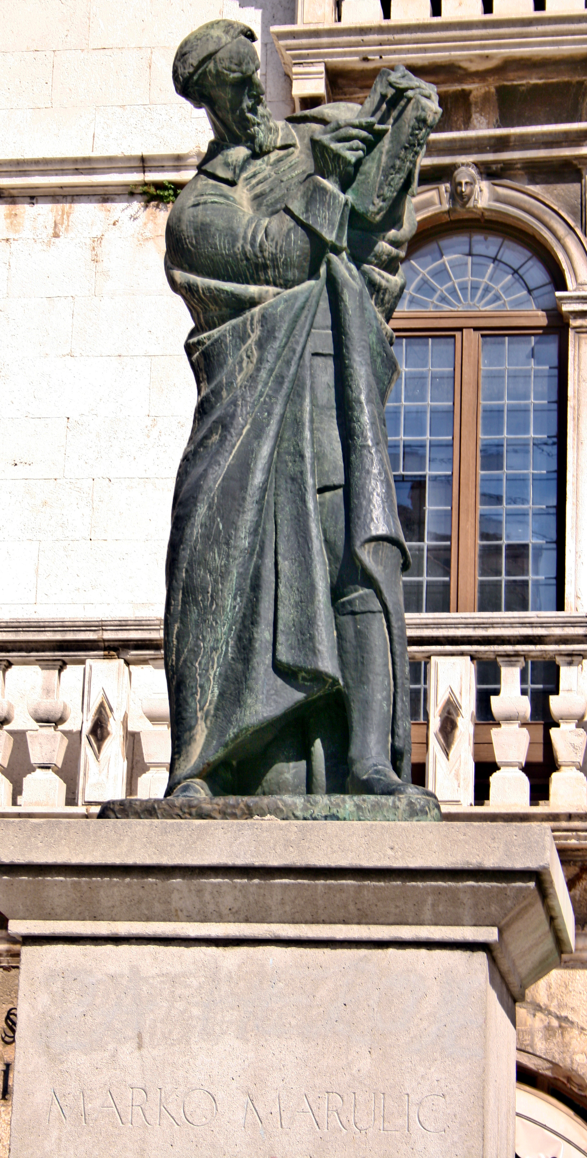 Split,_Marko_Marulić